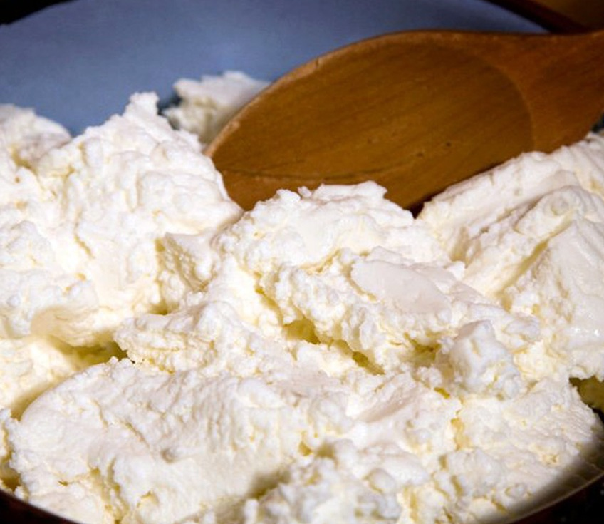 Queso de Fuente